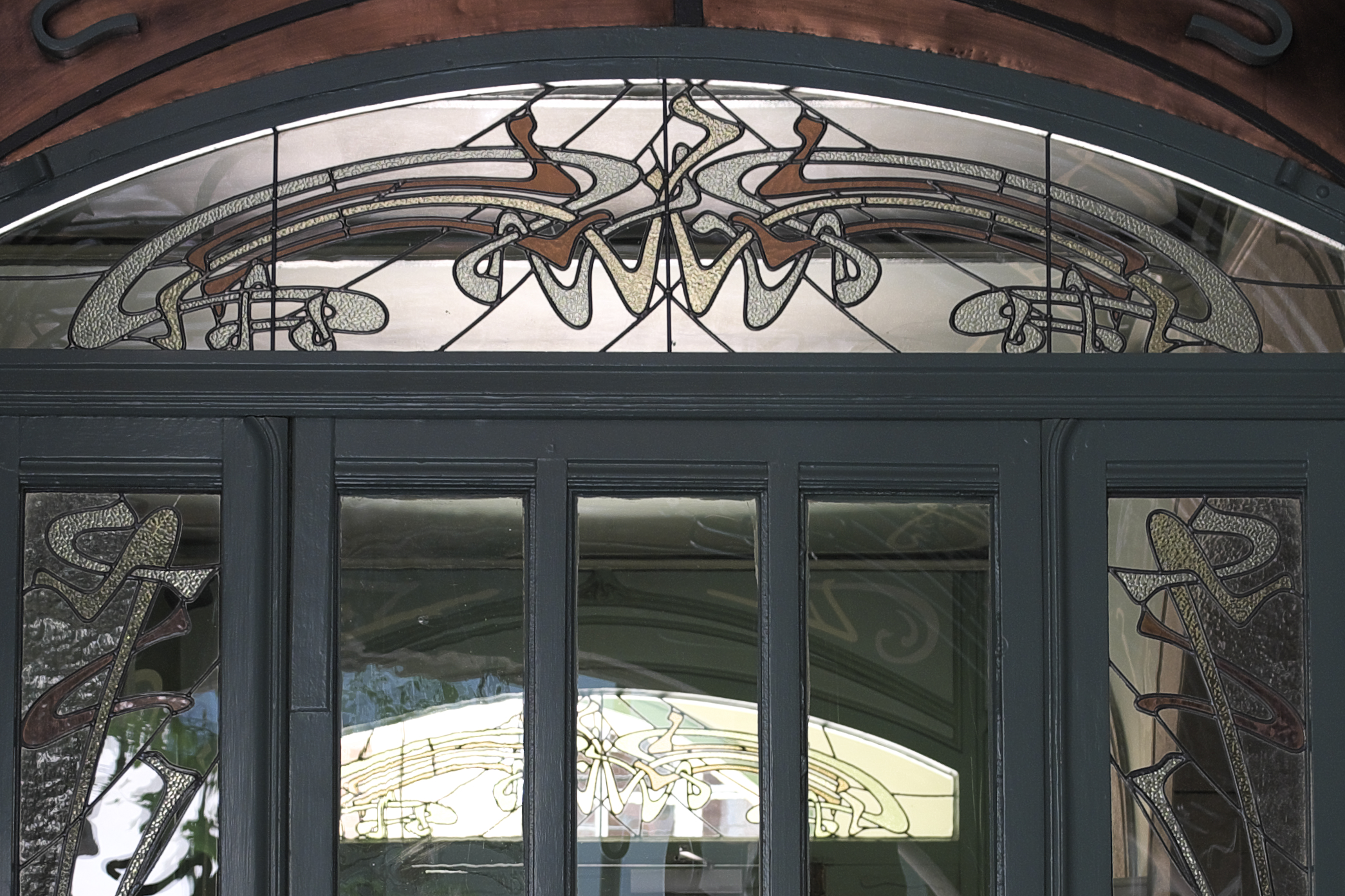 Castel Béranger in der Rue de la Fontaine N° 12/14 im 16. Arrondissement in Paris, von Hector Guimard errichtet, Tür mit Oberlicht und Jugendstildekor